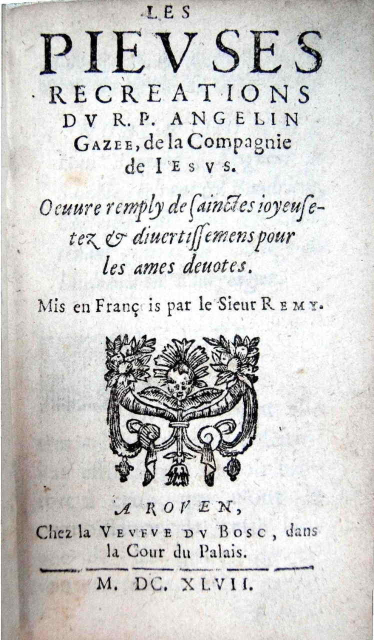 Photo de la page de titre des Pieuses recreations d'Angelin Gazet, édition 1647